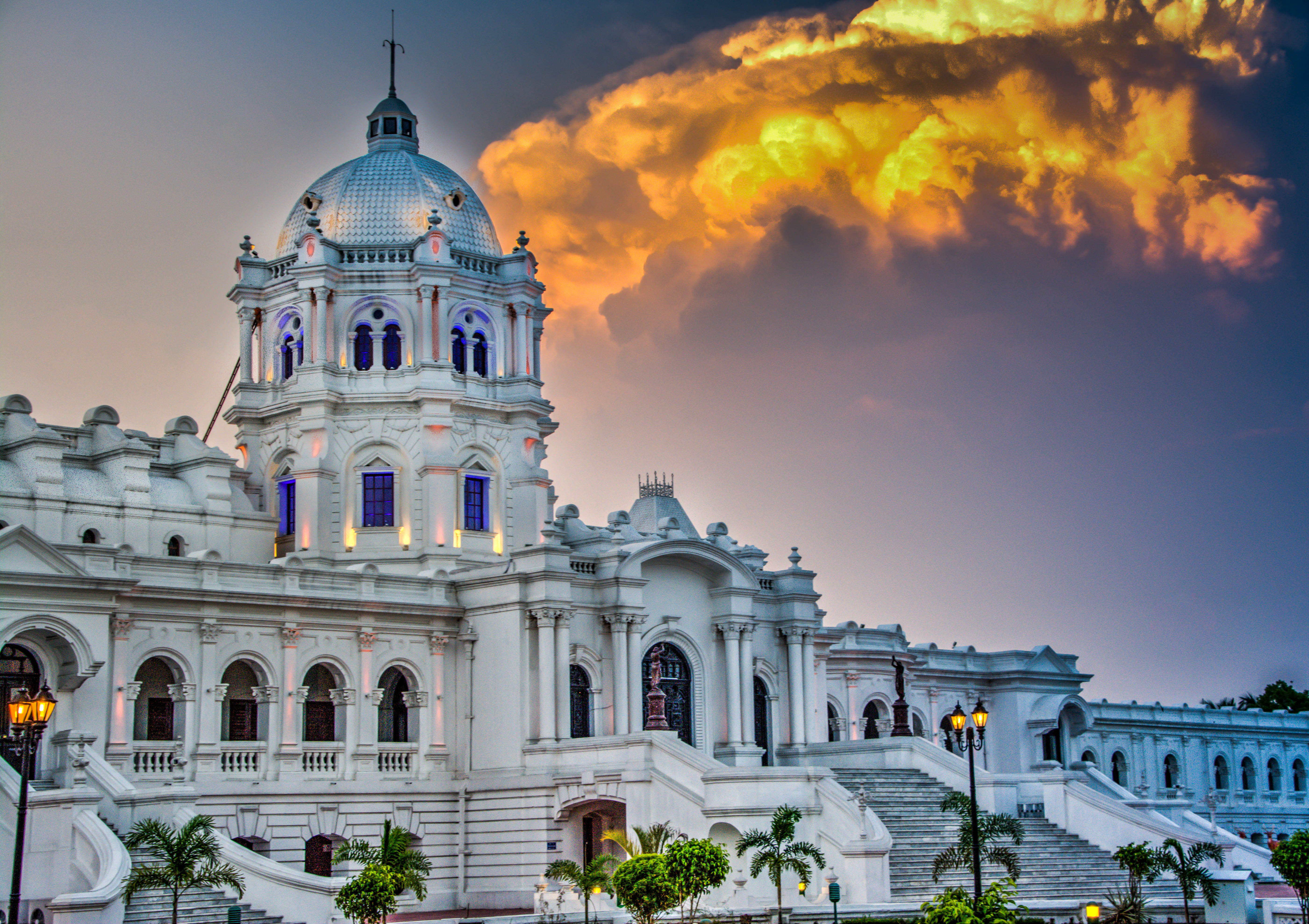 Buildings